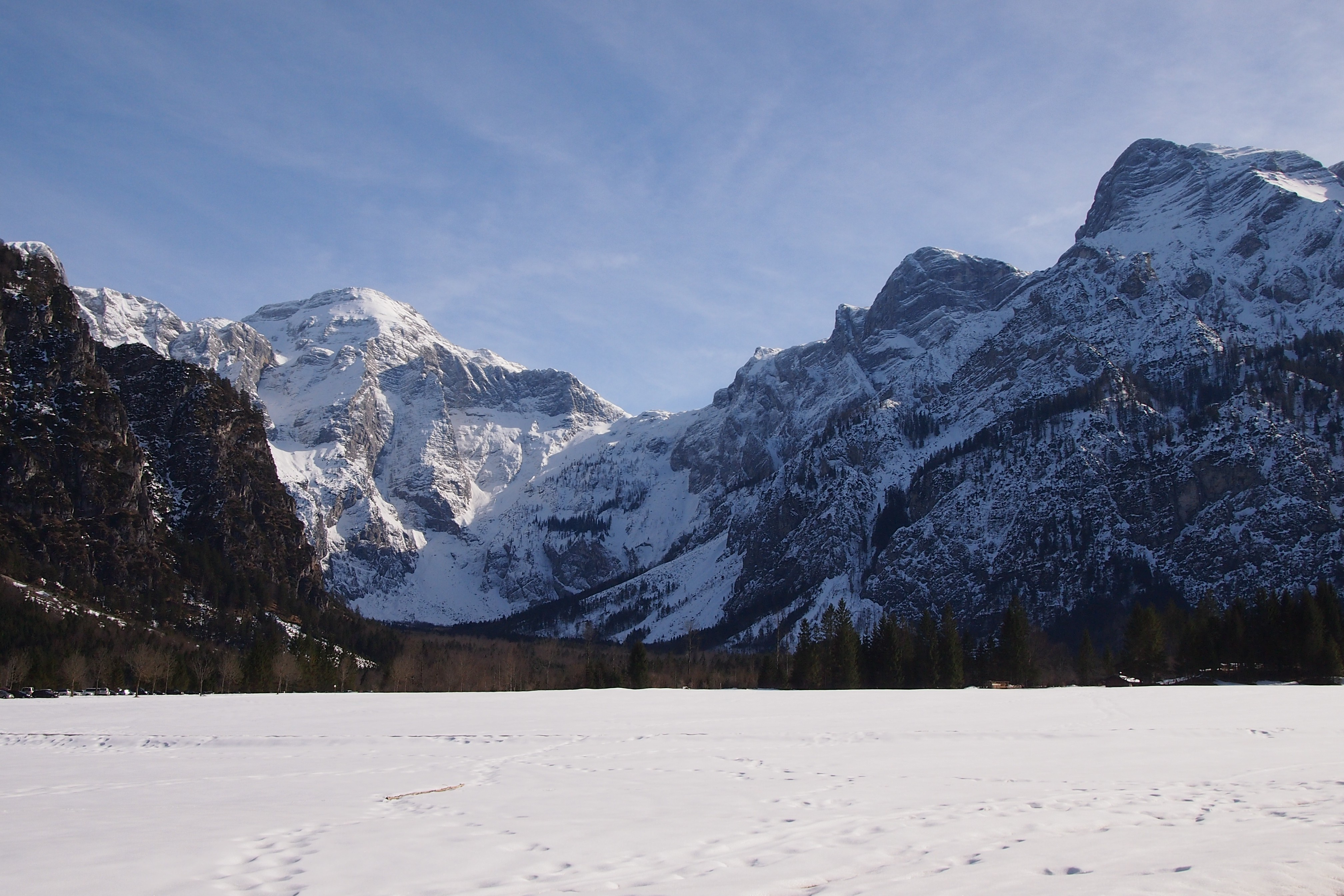 Rotgschirr vom Almsee aus gesehen